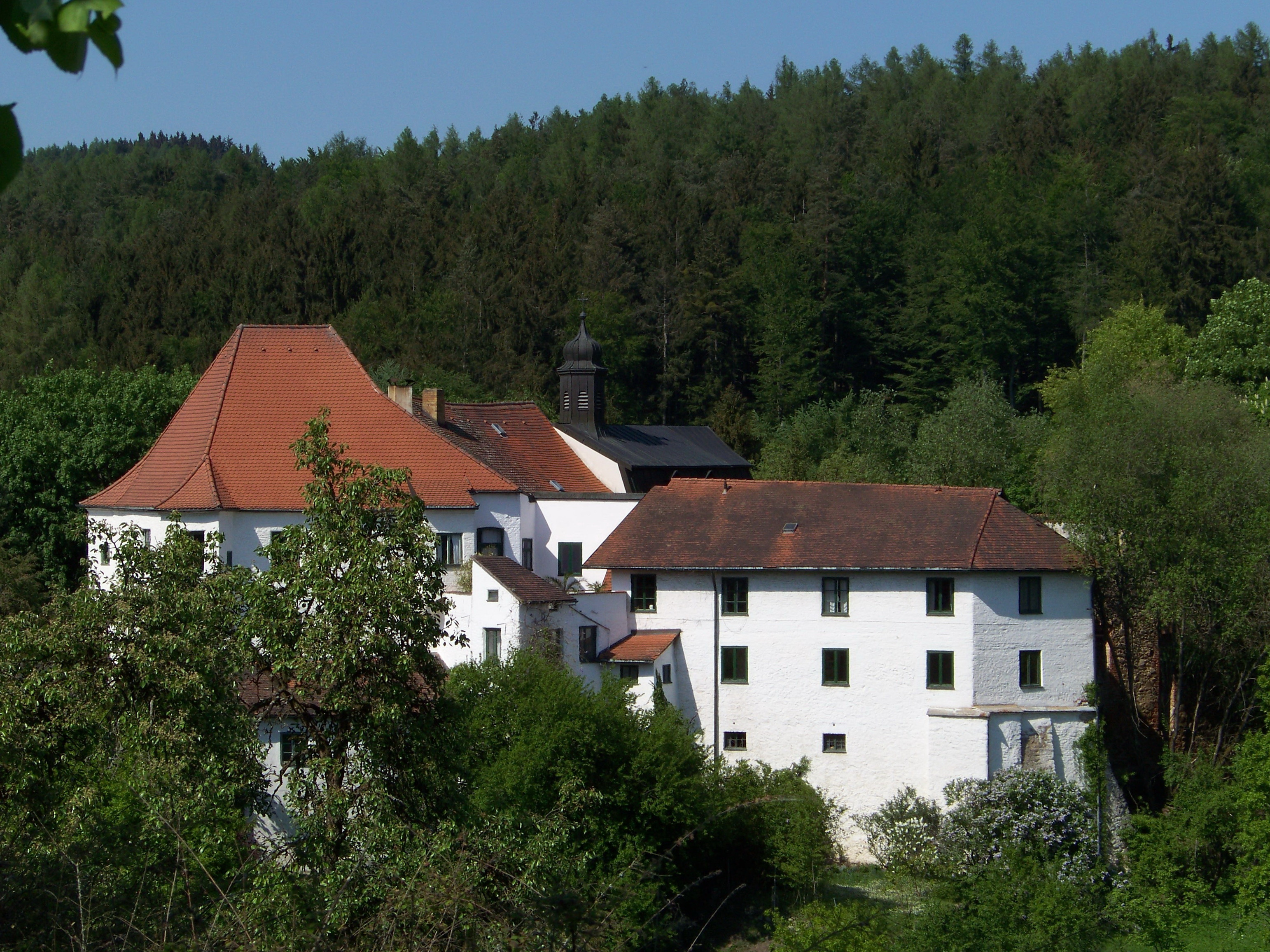 Wiesenfelden, Bayerwaldstraße 18. Schlossanlage. Errichtet 1569, im Kern 12. Jahrhundert; unregelmäßige Vierflügel-Gruppierung; Katholische Schloßkapelle St. Aegidius, Rokokobau von 1754; mit Ausstattung.